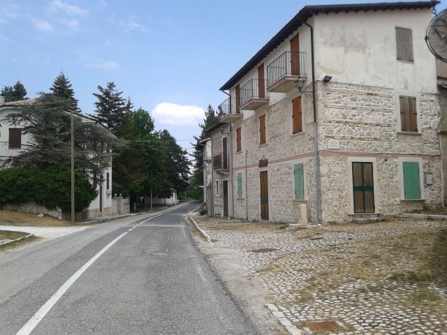 Scorcio fotografico di Gioia Vecchio